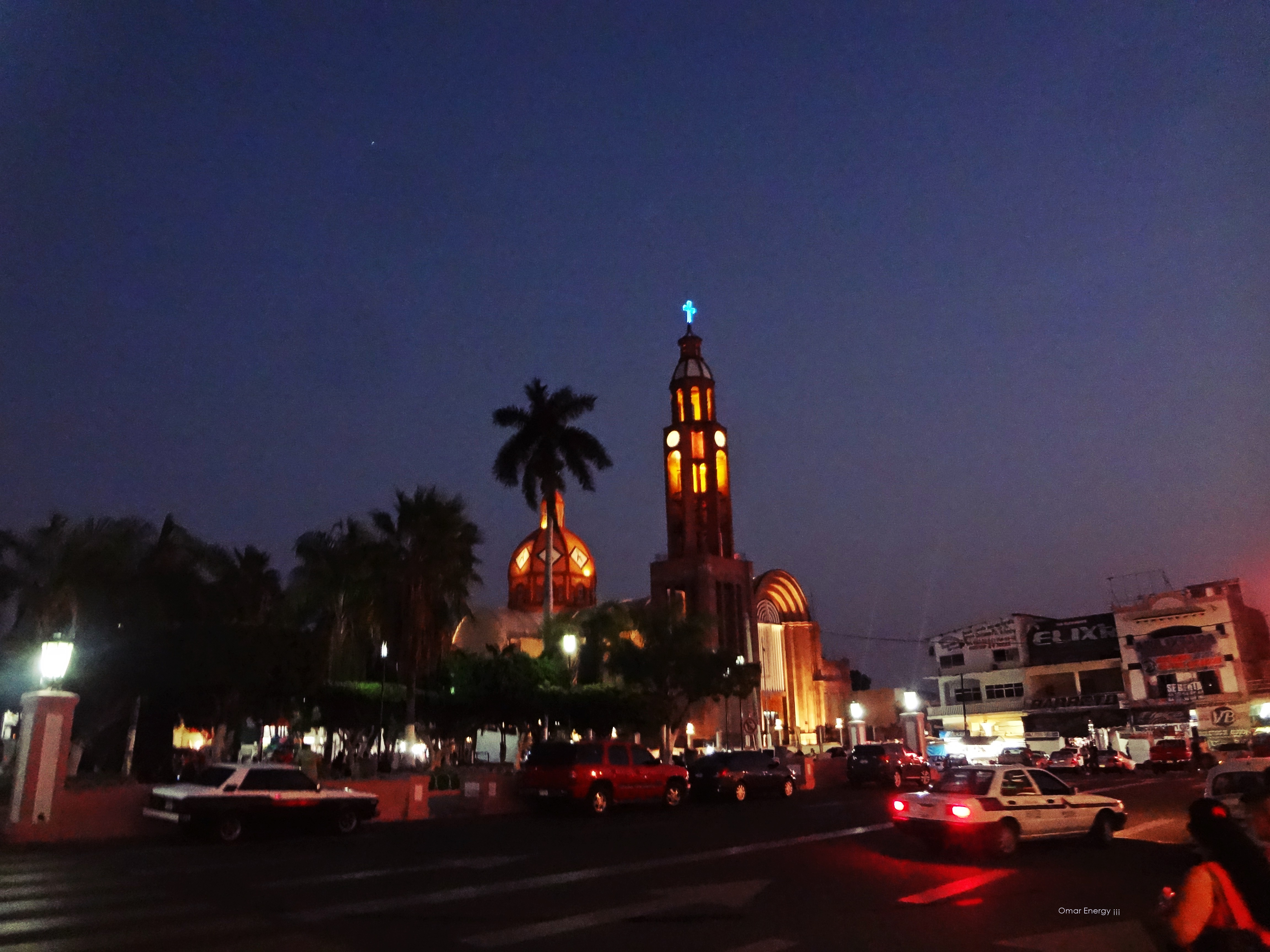 La Catedral de Apatzingan, cuenta con la torre mas alta en toda la región. Búscame en Facebook y en Youtube como; Omar Energy ¡¡¡ .